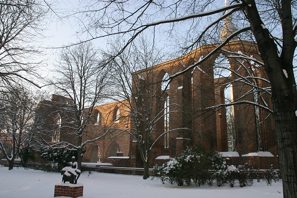 Berlin, Klosterkirche author: Elke Wetzig (elya) date: 2005-12-30